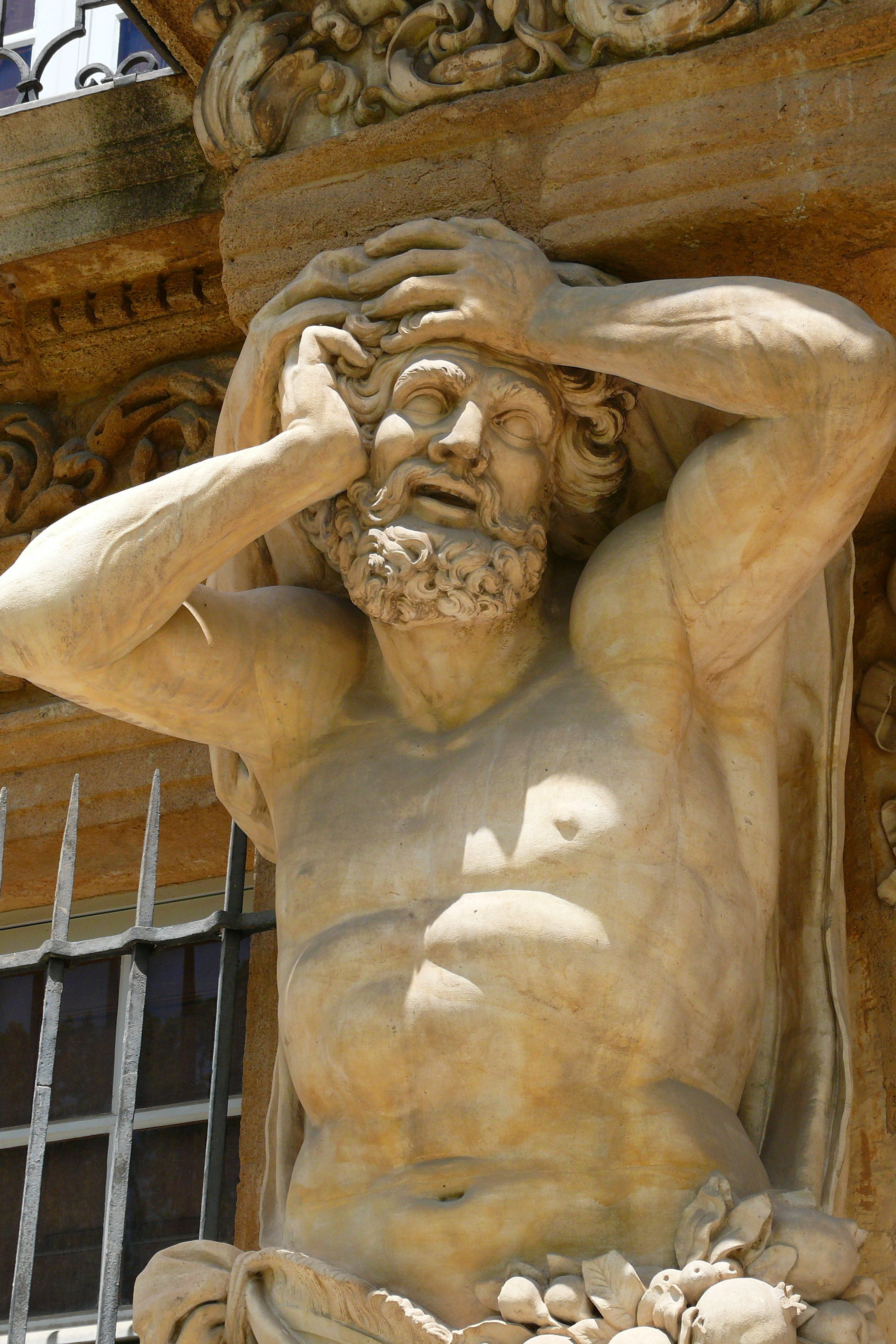 Atlant am Pavillon Vendome in Aix-en-Provence